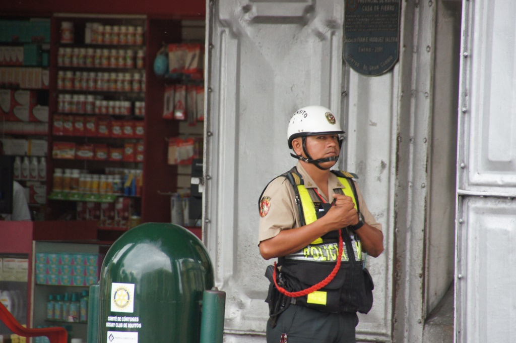 Seguridad local en Iquitos en la esquina de la Casa de Fierro.